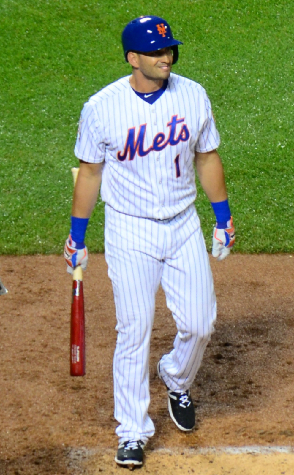 Justin Ruggiano